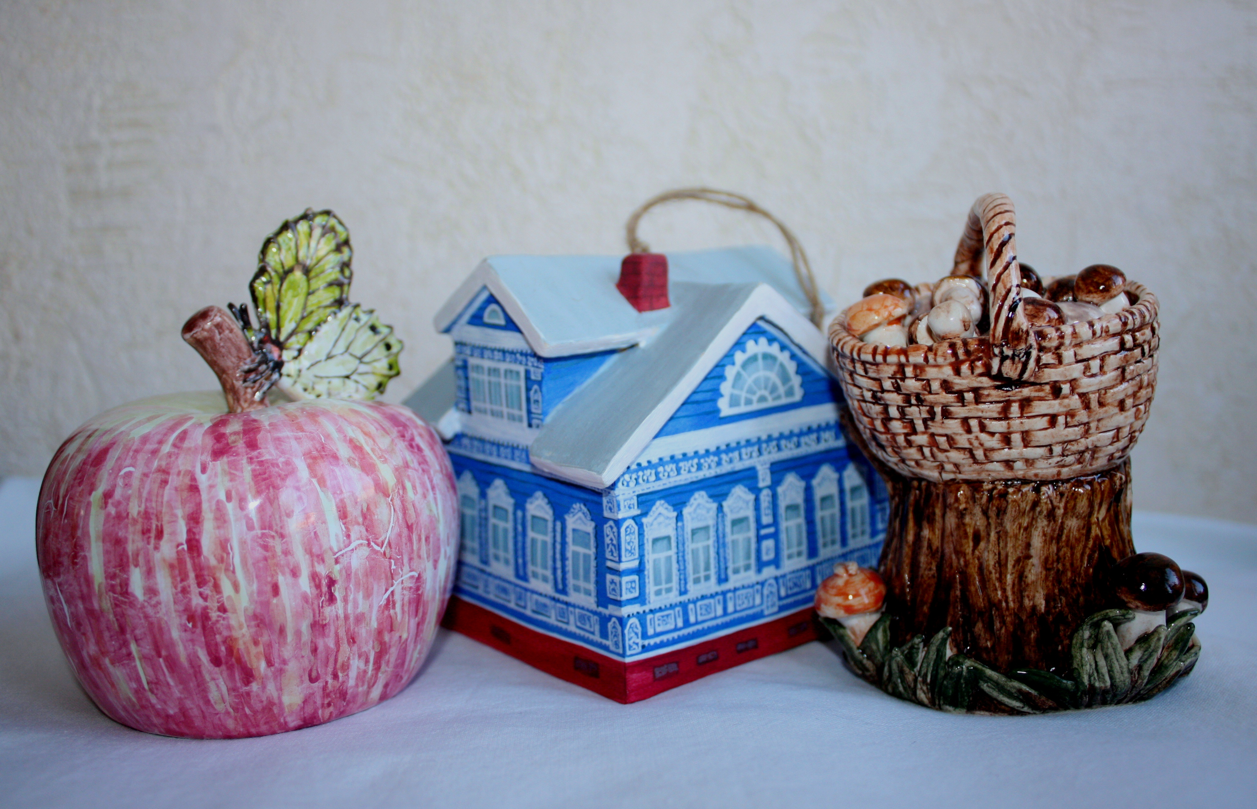 Колокольчики предметы